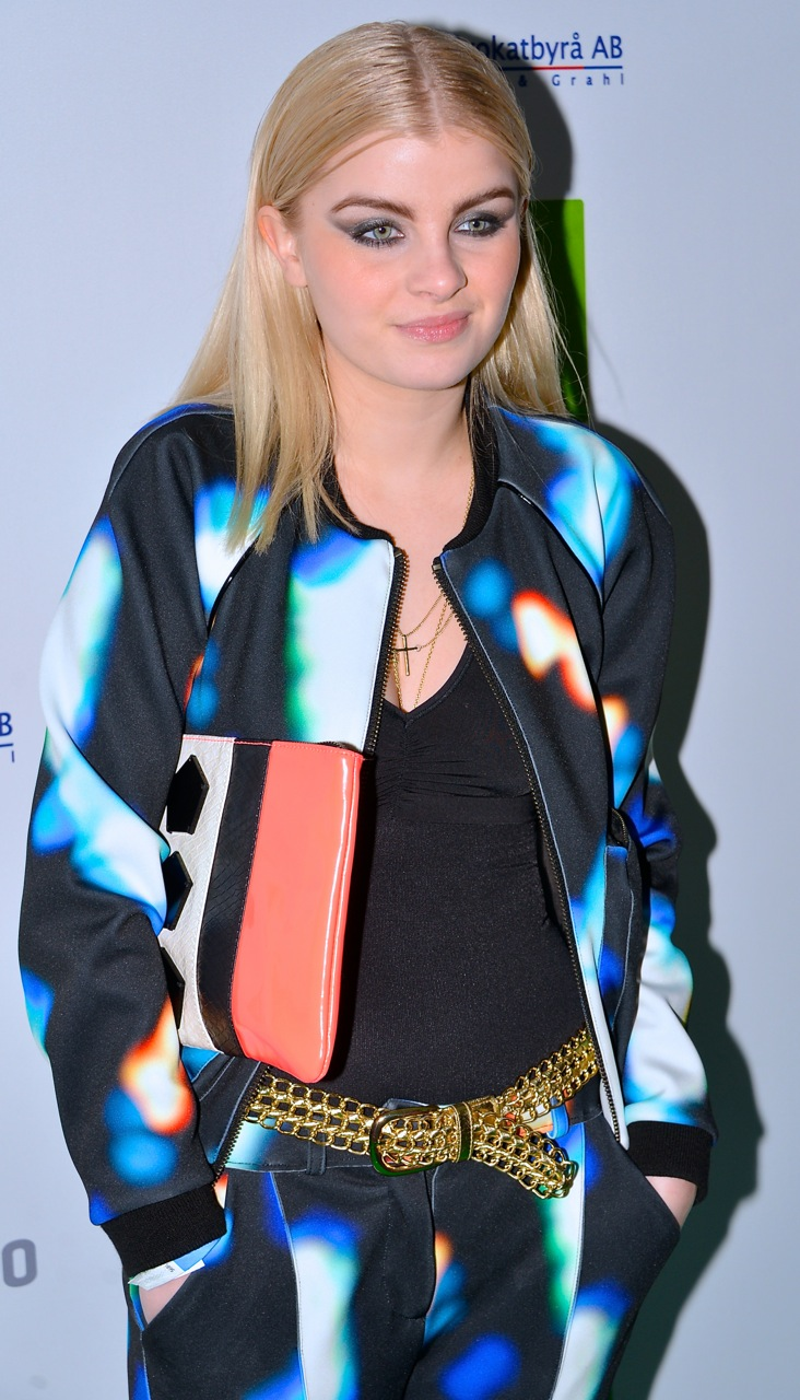 Amanda Fondell på Grammisgalan på Cirkus, Stockholm den 20 februari 2013.